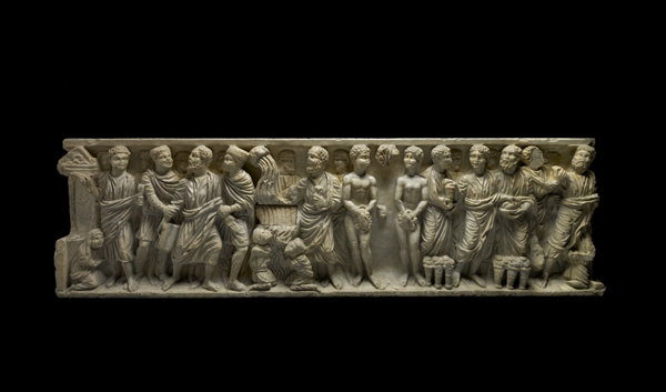 Sarcófago de Astorga (Bajo Imperio romano). Número de inventario: 50310.